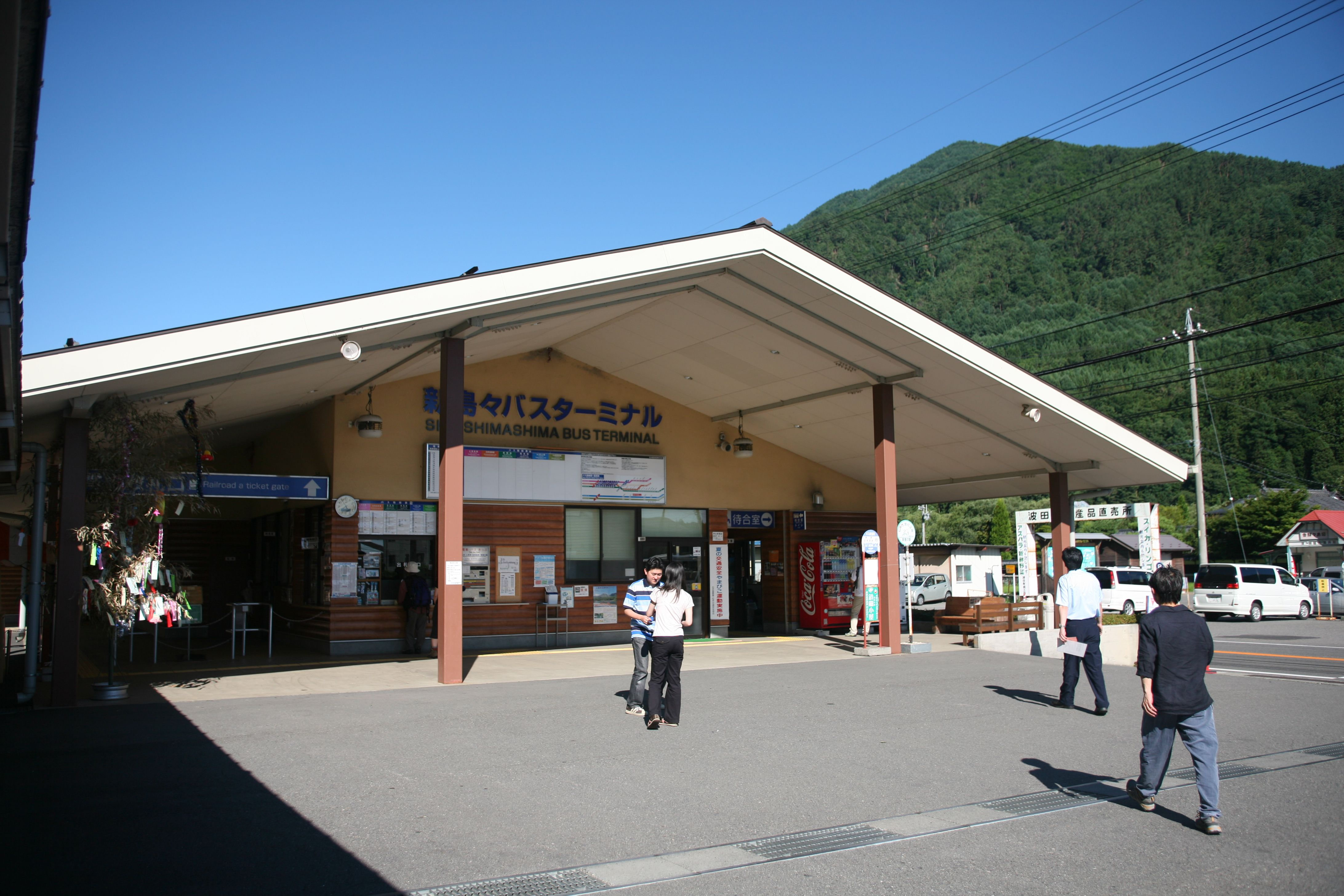 新島々駅